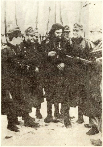 Srpskohrvatski / српскохрватски: Četnički komandant Leko Damjanović sa saborcima.